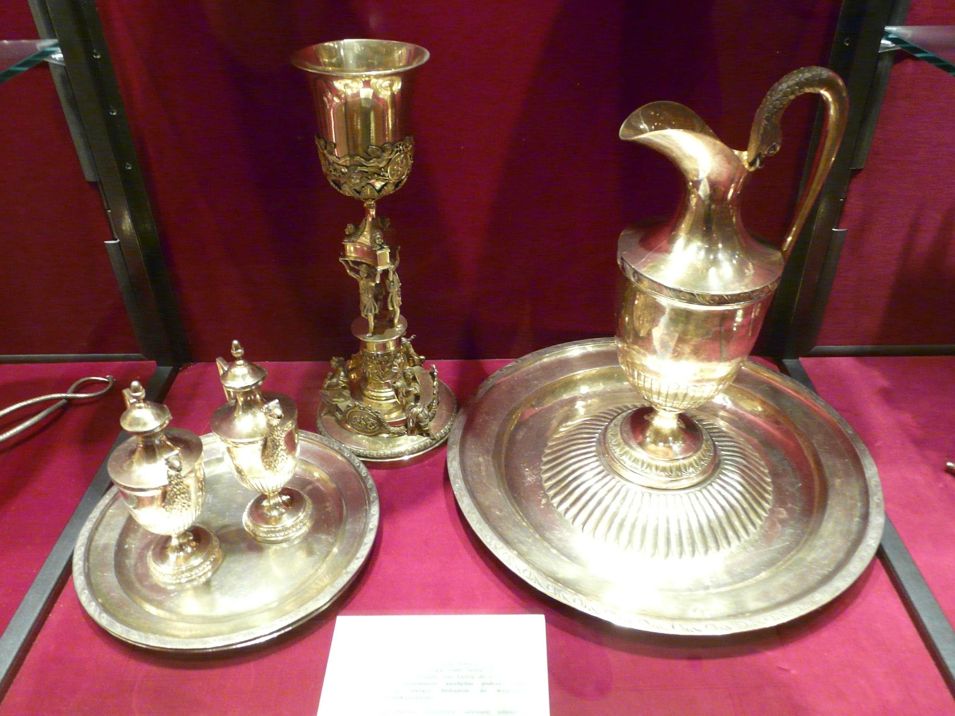 Museum of Archdiocese in Gniezno Garnitur ołtarzowy kardynała Ledóchowskiego. Jest to zestaw (jakby serwis) grupujący różne naczynia i sprzęty liturgiczne. Obejmuje on m.in. kielich, puszkę na komunikaty, tackę z ampułkami, flakony szklane, hostiarkę, kadzielnicę, łódkę do kadzidła, lavabo biskupie (dzban z misą), dzownek, tacki na piuske i pektorał, nożyce do tonsury, bugię (mały lichtarzyk), muszęl do sypania ziemi na trumnę, kropidło oraz kielnię do wmurowywania portatylii. Były to przedmioty niezbędne podczas liturgii pontyfikalnej oraz służące biskupom do wypełnienia ich obowiązków. Srebro częsciowo złocone, repusowane, stancowane i cyzelowane. Wykonane w Fuldzie przez firmę Papista ok. 1862-1865 r.. Wykazuje wyraźne cechy klasycystyczne. To jeden z największych tego typów zestawów na świecie. Jest darem króla Belgii Leopolda I z roku 1865 dla wówczas jeszcze biskupa Mieczysława Ledóchowskiego, nuncjusza papieskiego w Brukseli, z okazji zakończenia służby dyplomatycznej i przejścia na stolicę gnieźnieńsko - poxnańską. See also: Imaage:Museum of Archdiocese in Gniezno - zestaw Ledóchowskiego 01.JPG and Image:Museum of Archdiocese in Gniezno - zestaw Ledóchowskiego 03.JPG